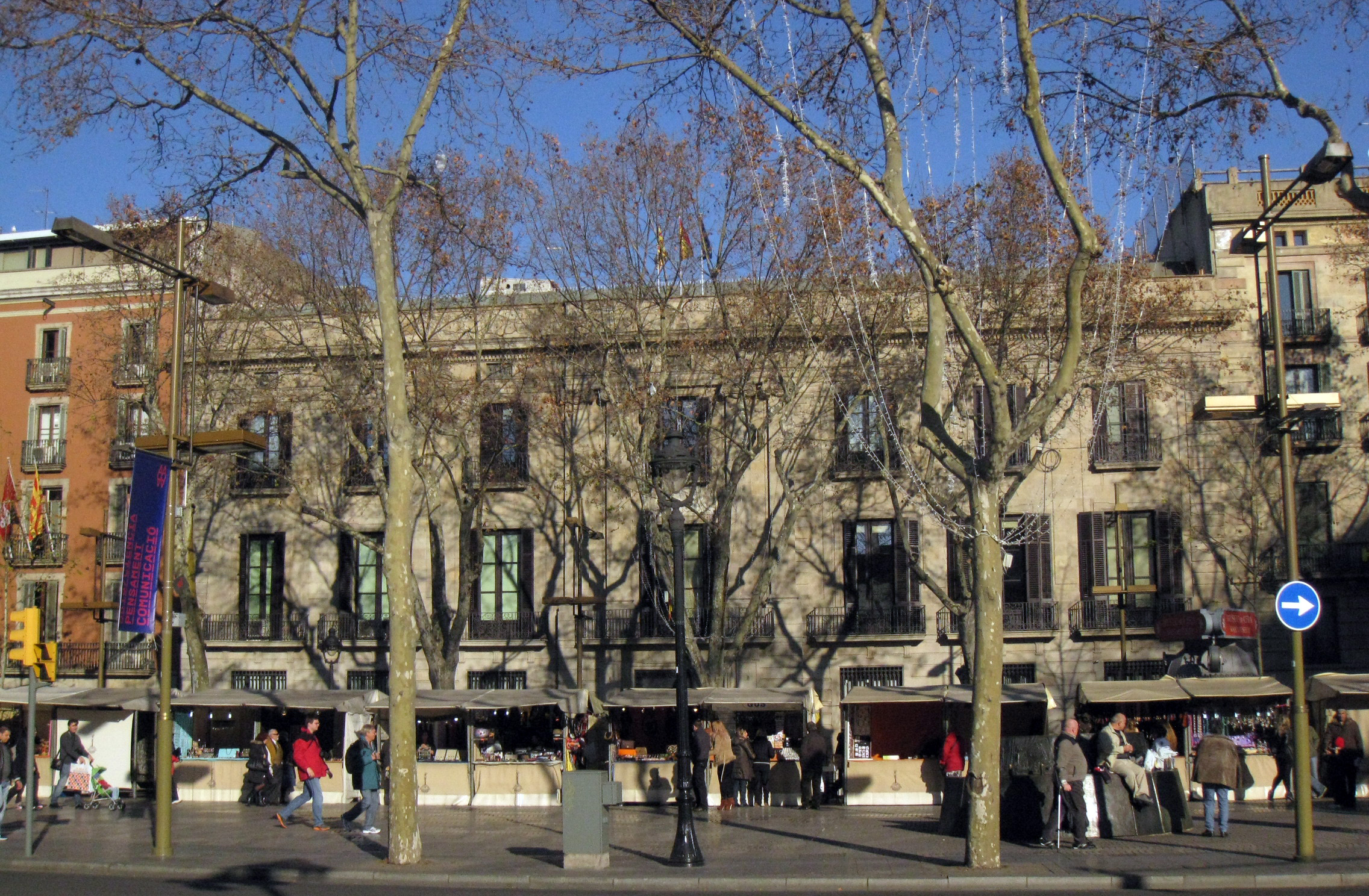 Casa March de Reus (Barcelona)